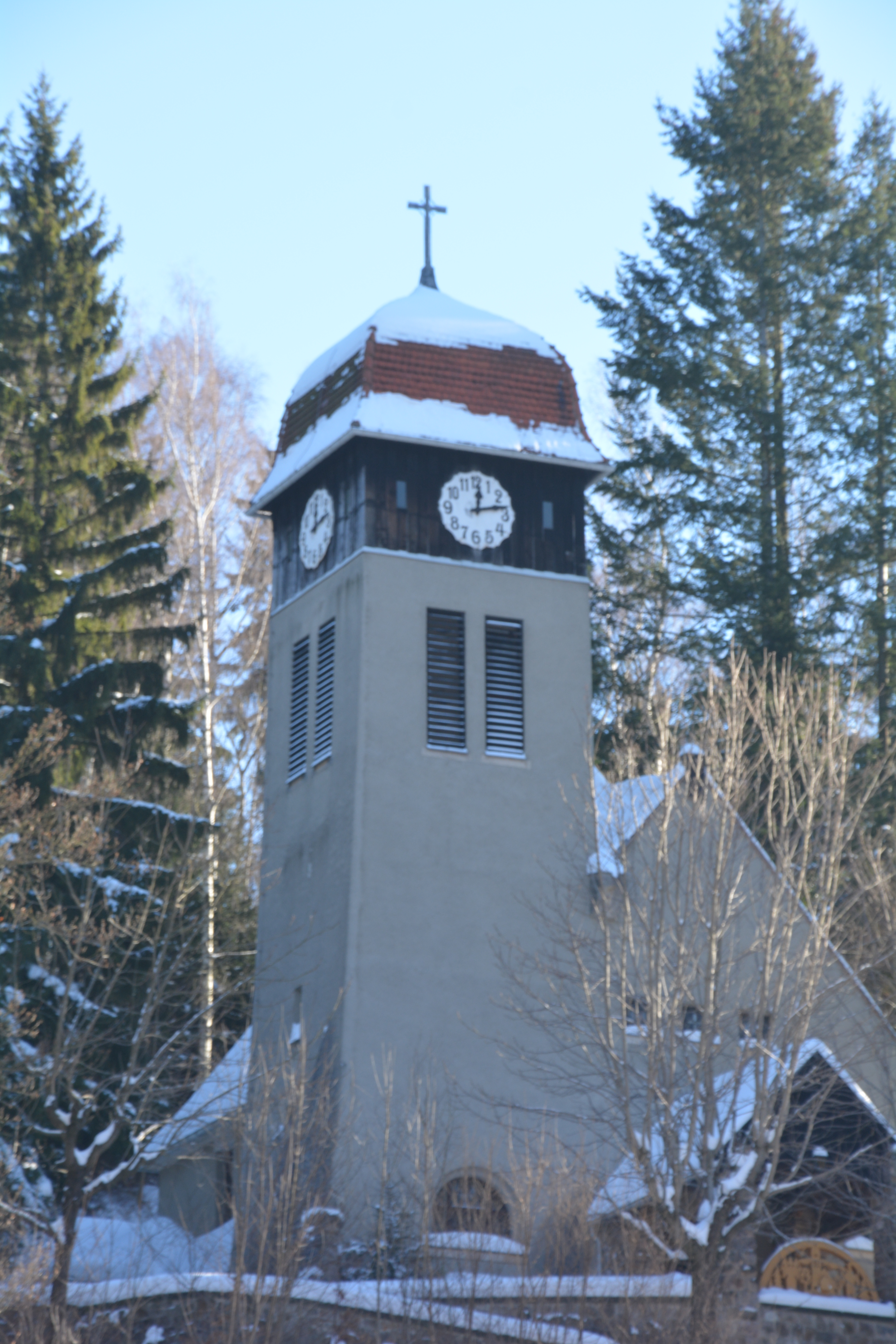 Bergkirche Kurort Kipsdorf, nach einen Entwurf von William Lossow und Max Hans Kühne 1908 erbaut.